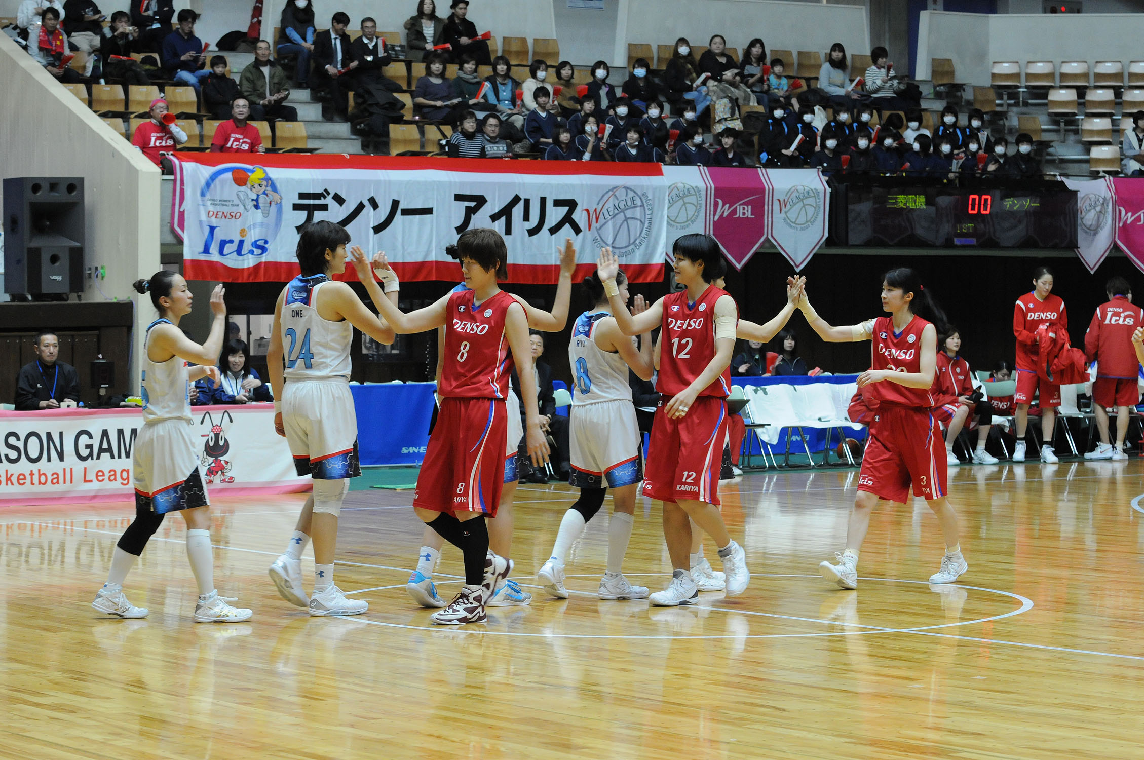 WJBL 16-17レギュラーリーグ、デンソー対三菱電機。秋田県立体育館。